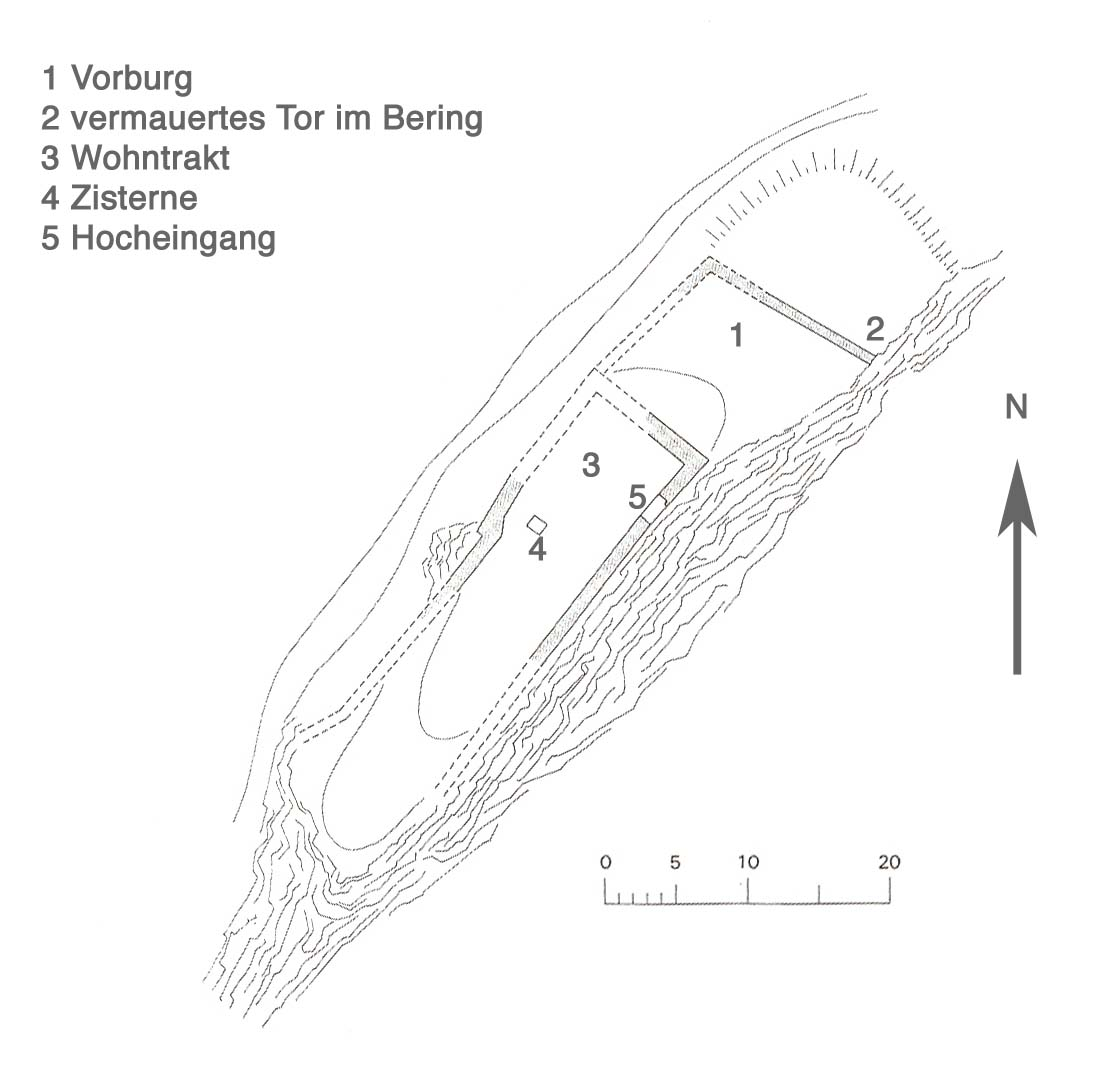 Quelle: Otto P. Clavadetscher / Werner Meyer - Das Burgenbuch von Graubünden. Zürich / Schwäbisch Hall 1984